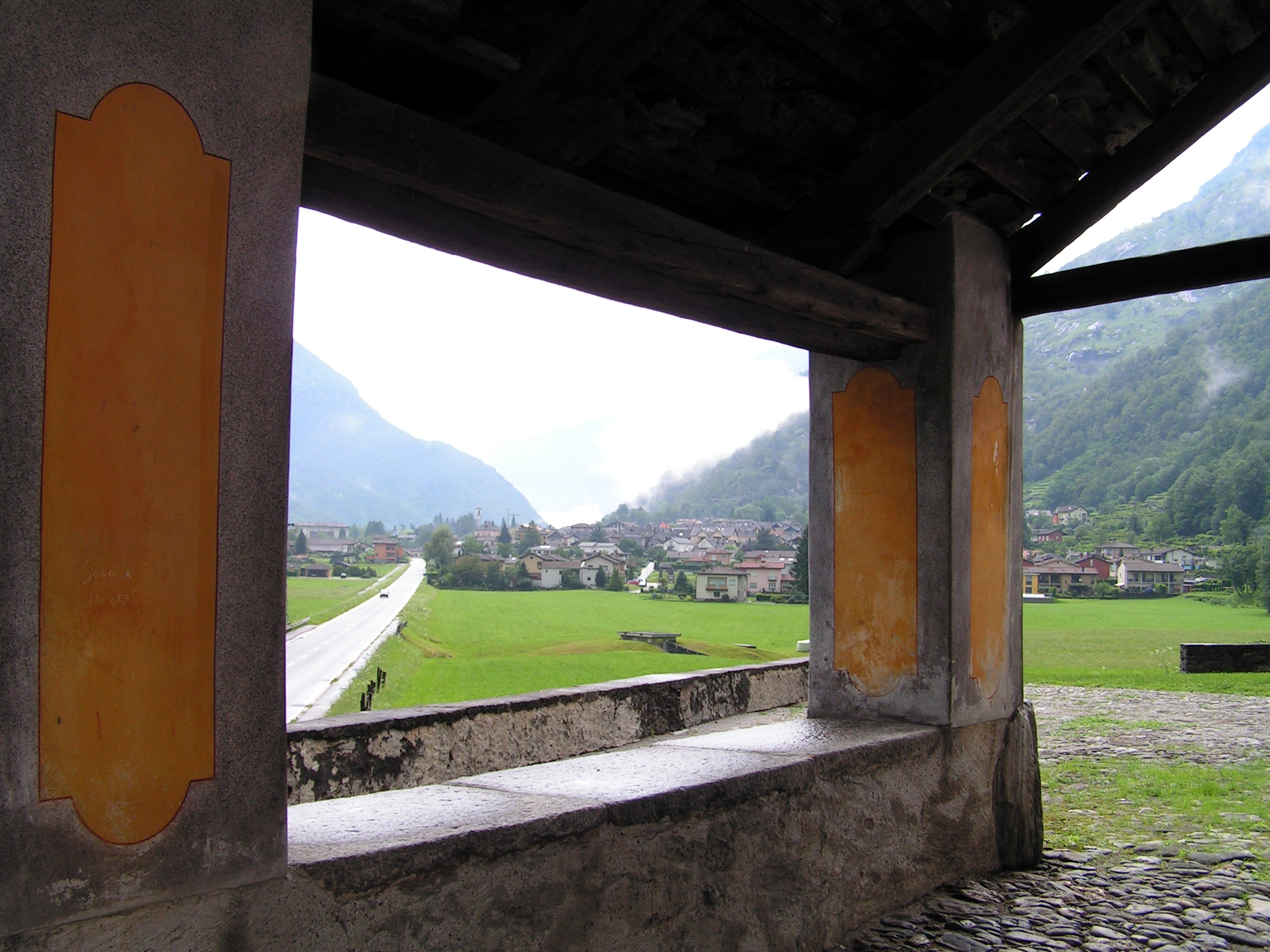 Via Cantonale Vecchia, Maggia. Le village de Maggia, vu de l'église de Santa Maria delle Grazie in Campagna.